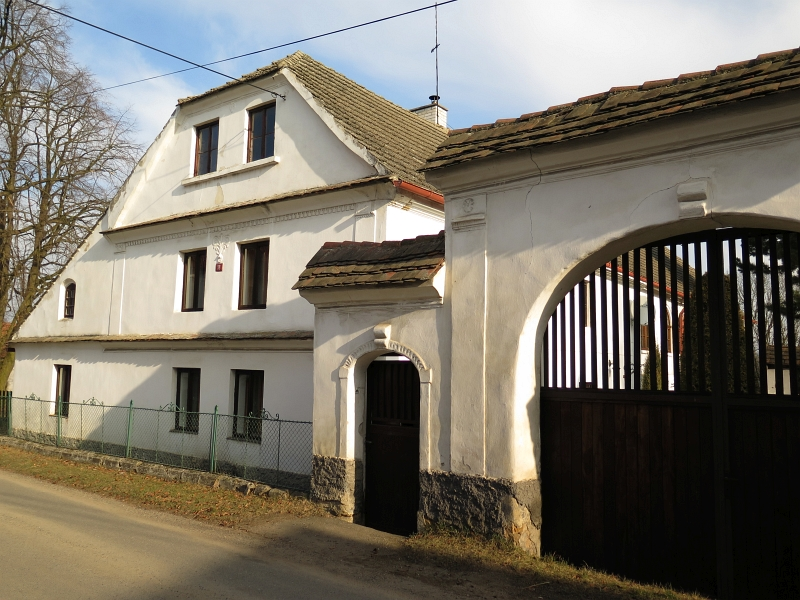 Usedlost Kanina čp. 18.